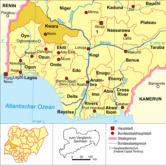 Politische Karte Nigerias (Bundesstaat Kwara hervorgehoben)